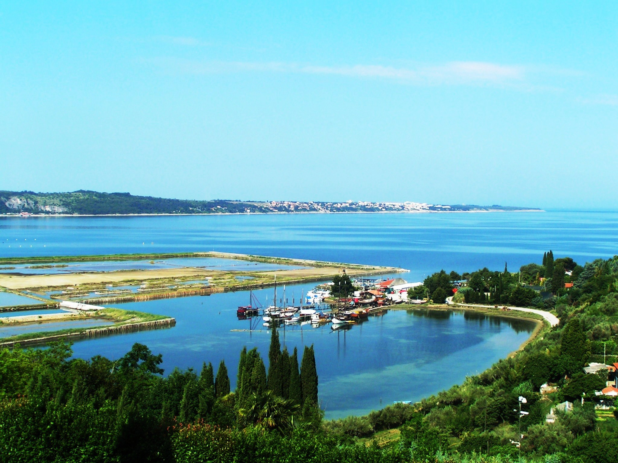 Portoroz